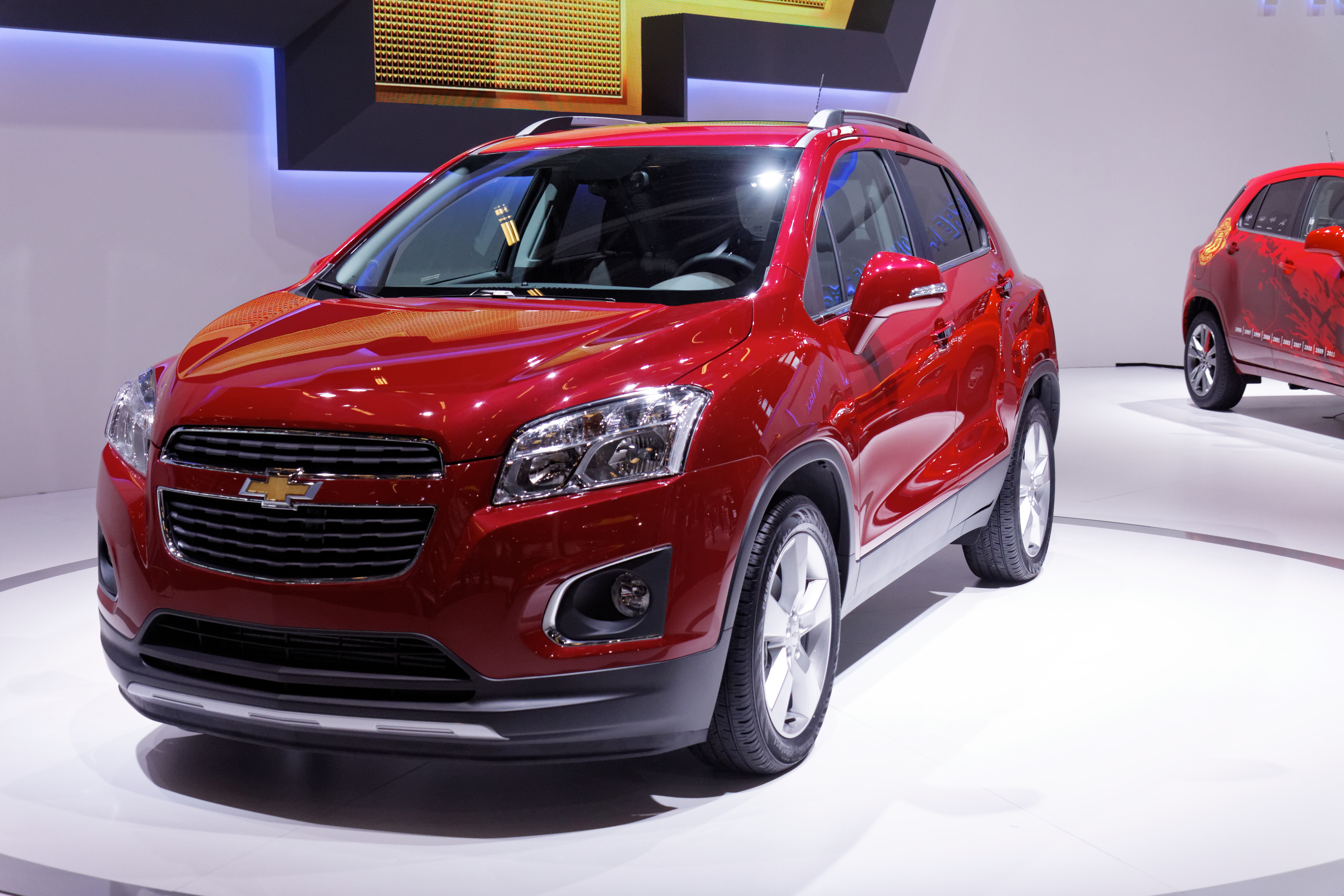 Une Chevrolet Trax présentée lors du Mondial de l'automobile de Paris 2012.